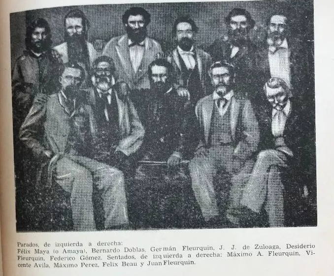 Parados de izquierda a derecha: Félix Maya do Amaya, Bernardo Doblas, German Fleurquin, J. J. de Zeuloaga, Desiderio Fleurquin, Federico Gómez. Sentados de Izquierda a Derecha: Máximo A. Fleurquin, Vicente Ávila, Máximo Pérez, Felix Beau y Juan Fleurquin